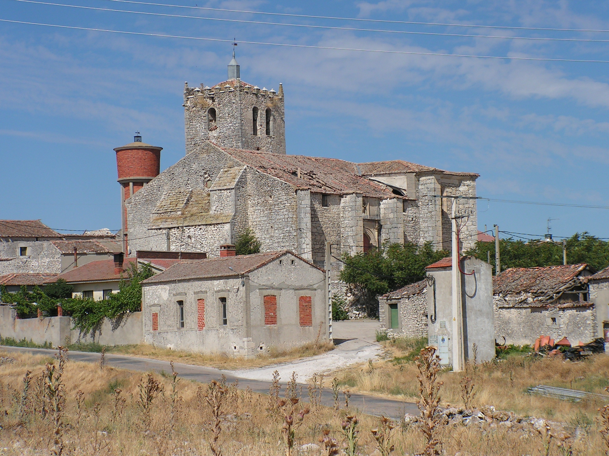 Iglesia de San Juan Bautista en Fuentes de Cuéllar (Segovia), vista desde el sur